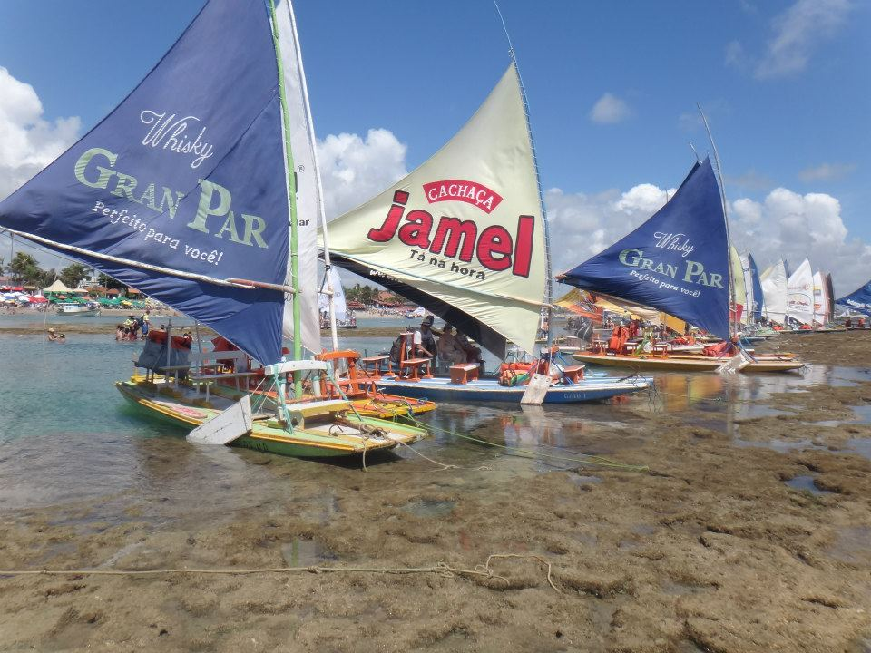 Jangadas na Praia de Vila em Porto de Galinhas (PE)